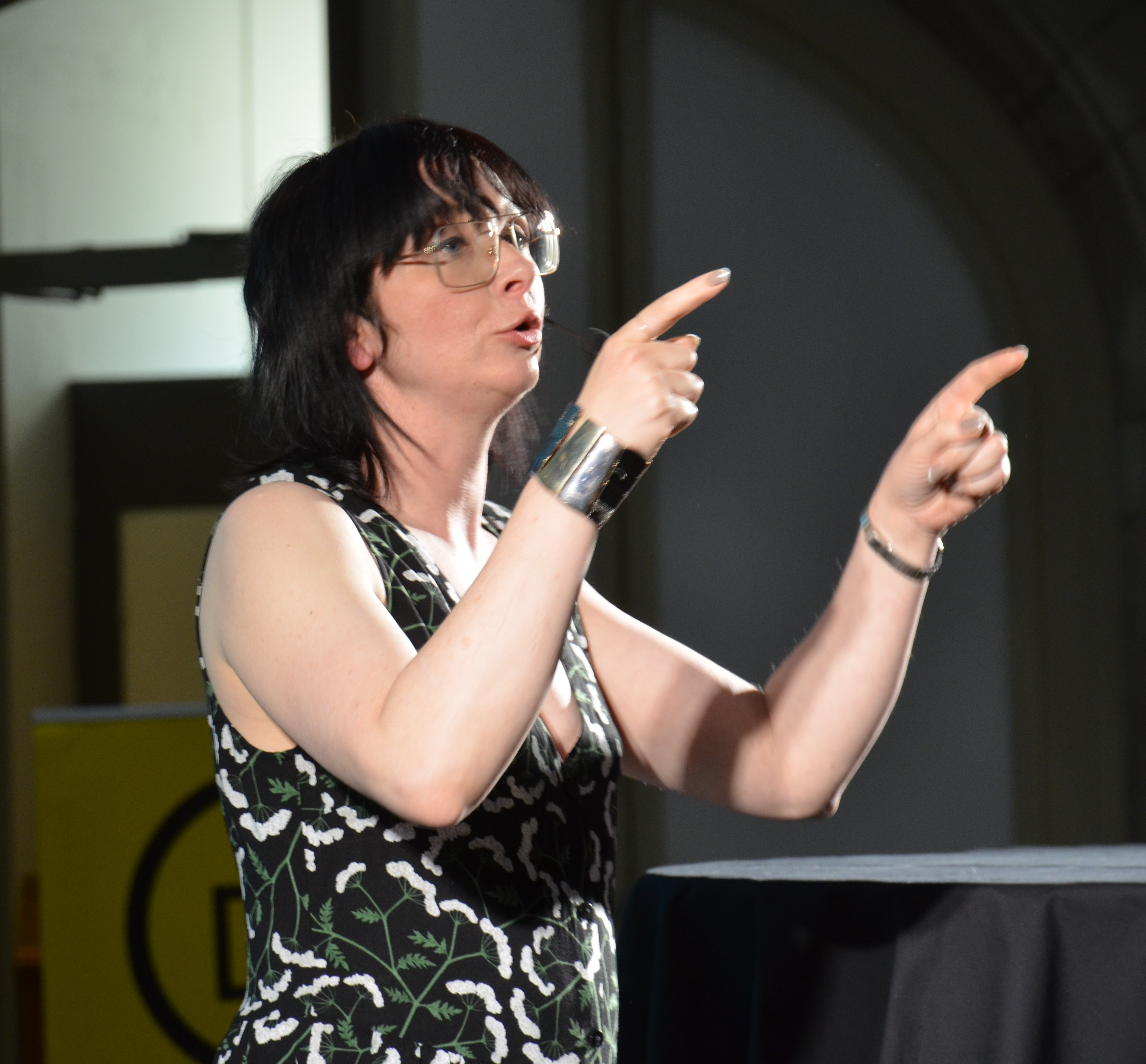 Pernilla Glaser, at Nordiska Museet, Stockholm, at the 2013 annual meeting of Svenska Museiföreningen